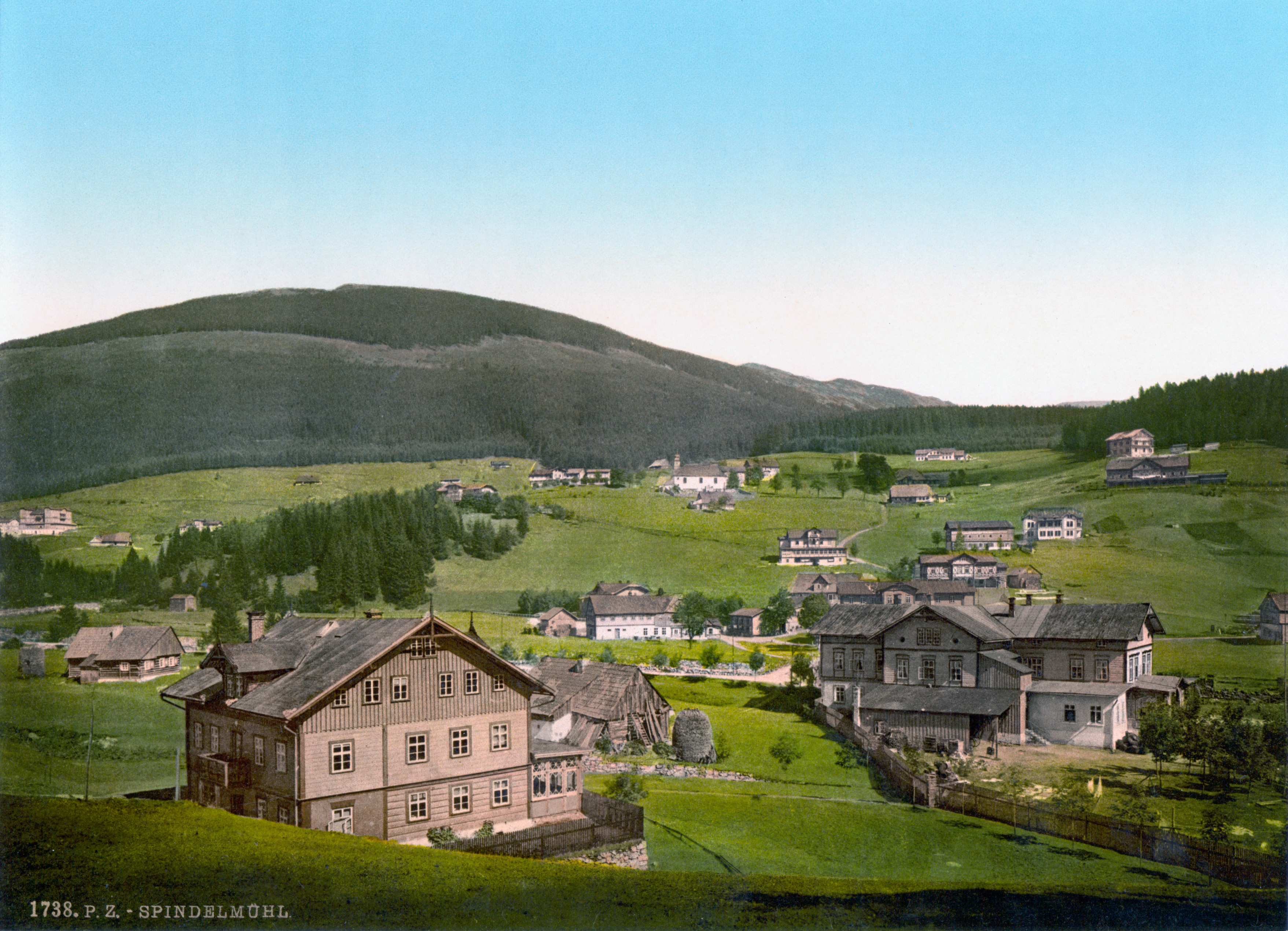 Spindelmühl um 1900